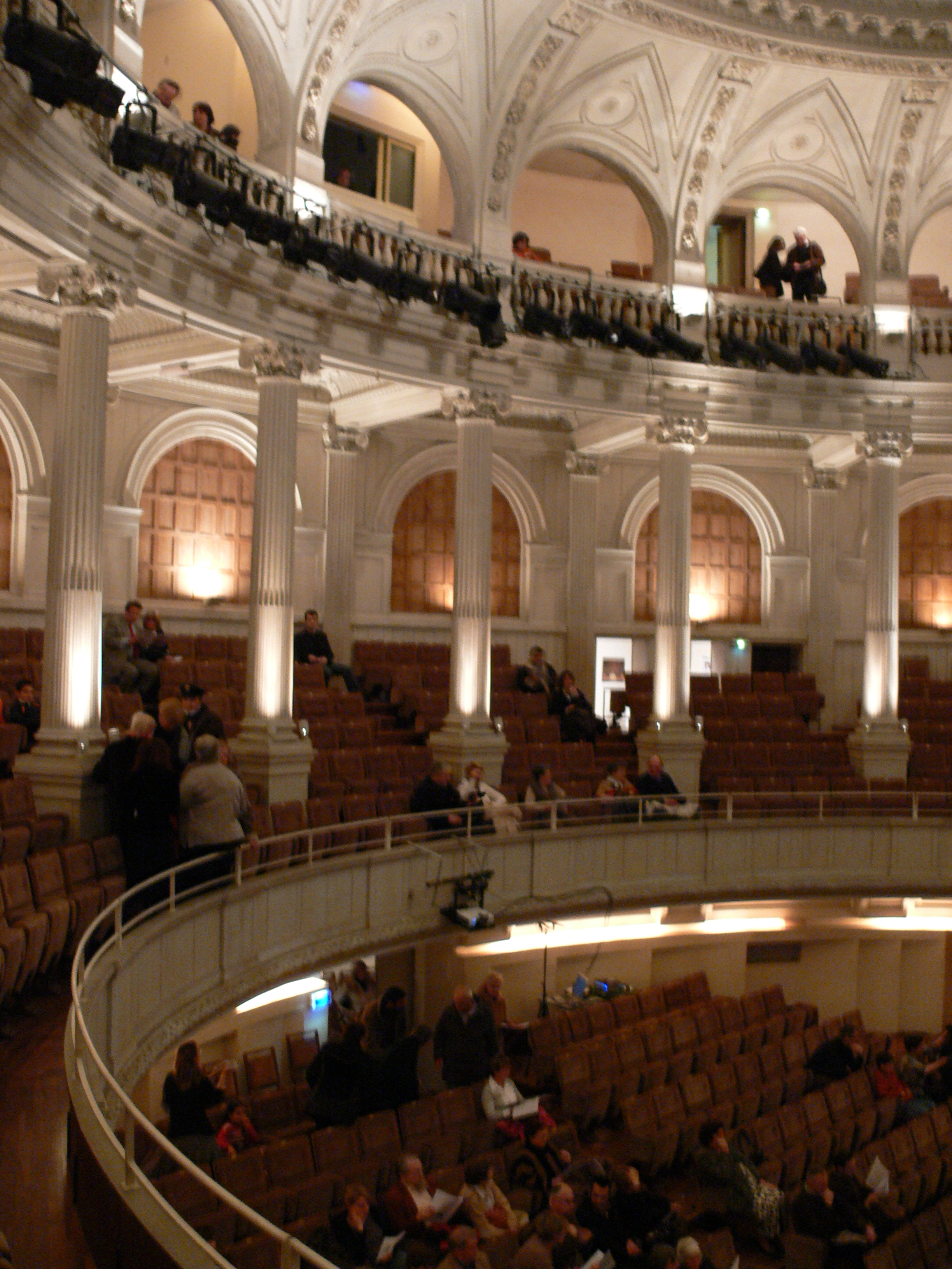 Compiègne, France: Théâtre Impérial de Compiègne